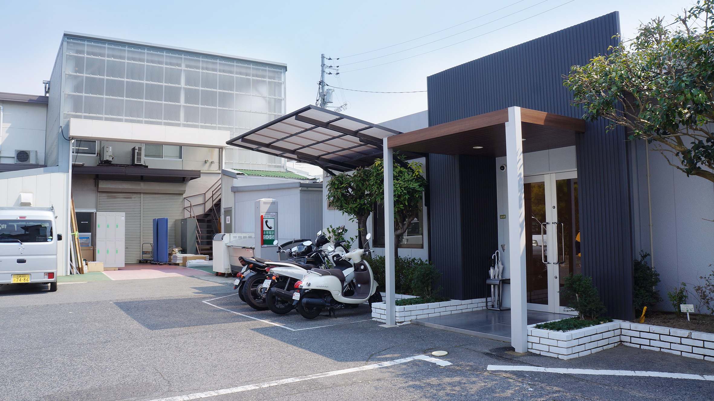 広島に本社のある東洋電装株式会社の広島本社の外観です